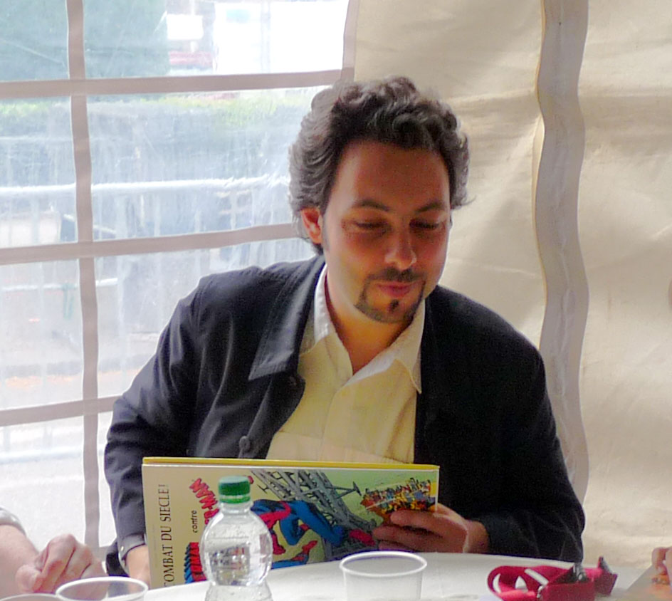 Xavier Dorison au Festival européen de la bande dessinée Strasbulles 2009